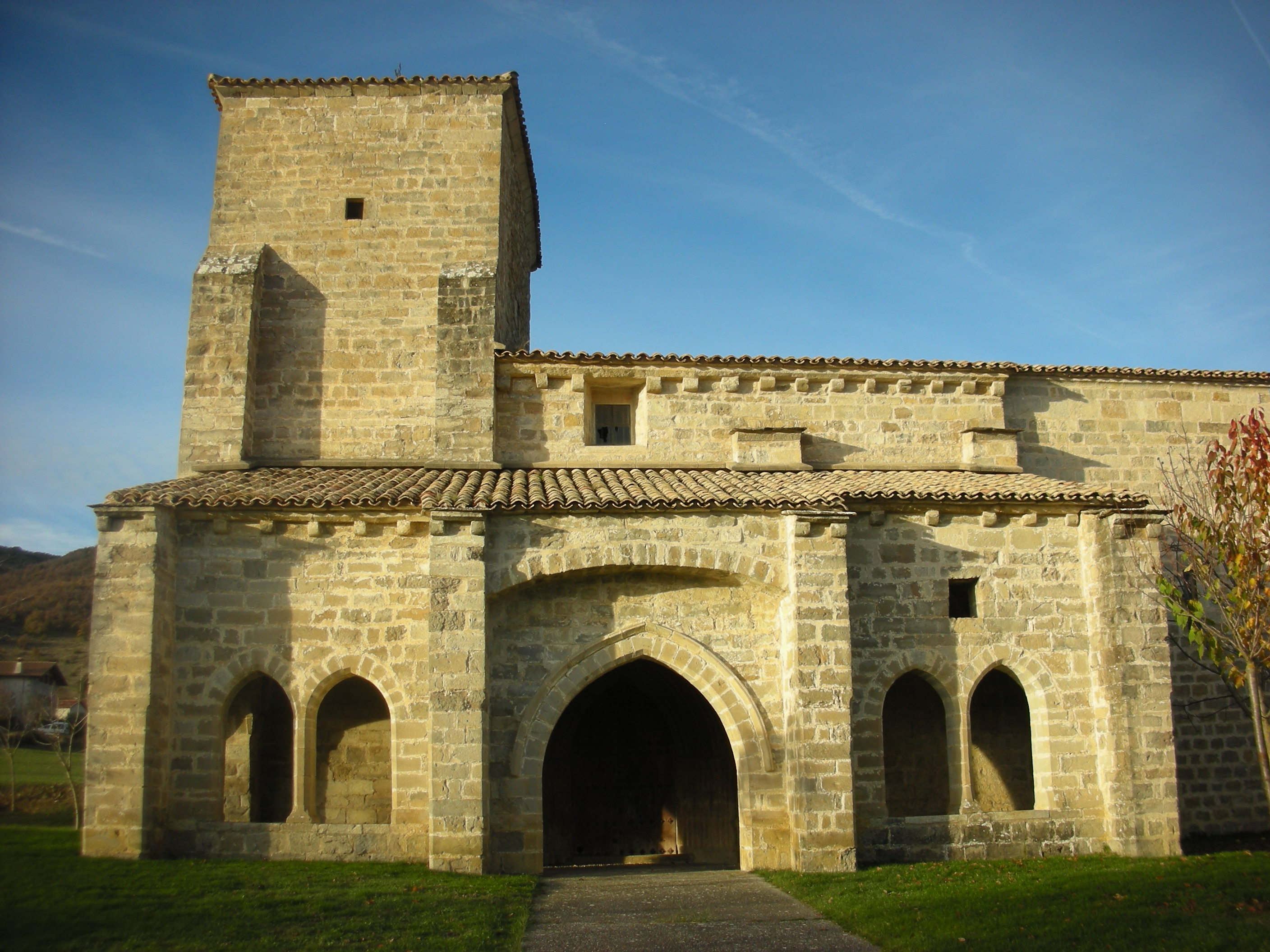 Iglesia de Oteiza de Berrioplano (Navarra)